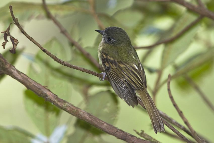 Leptopogon taczanowskii